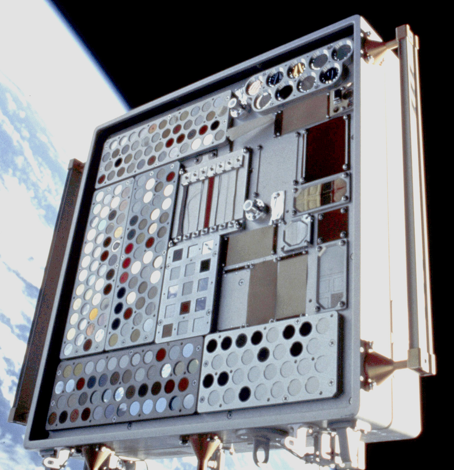 MISSE 2: PEC2 - TRAY1